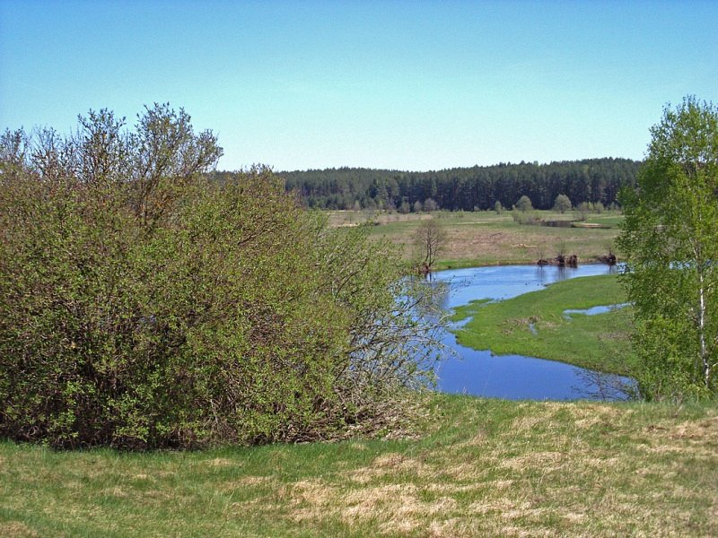 Месца, дзе раней знаходзіўся фальварак Крынкі